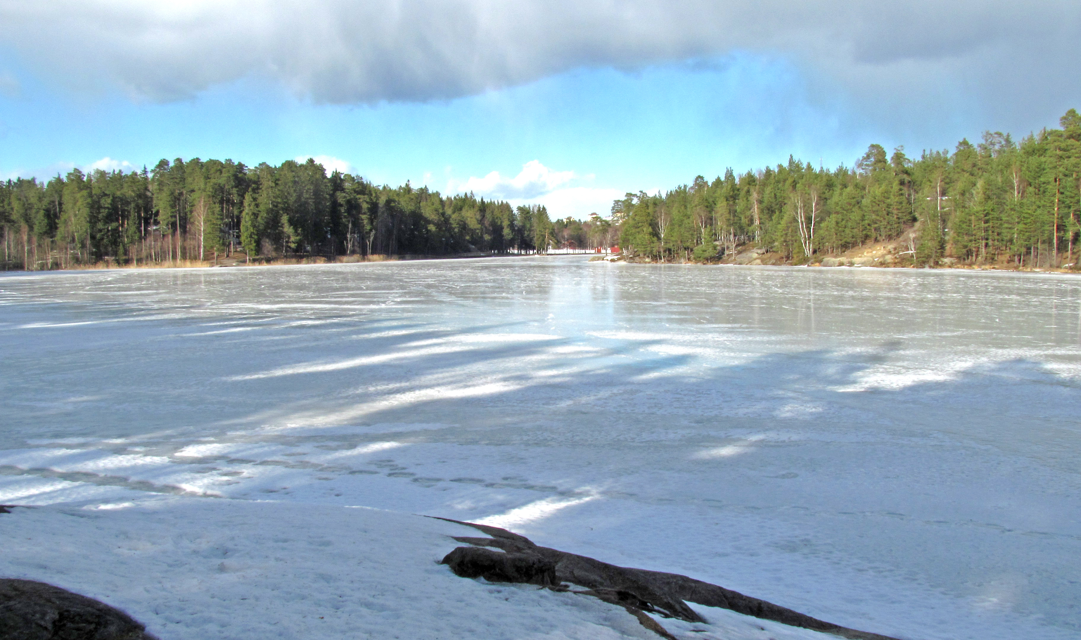 Nedre Rudasjön, vy åt norr